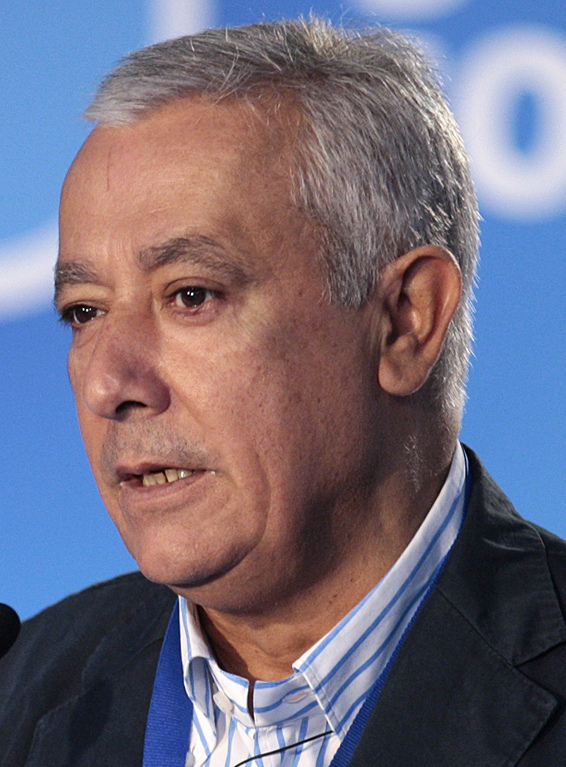 INTERVENCION DE JAVIER ARENAS EN LA ESCUELA DE VERNANO DEL PP EN GANDIA